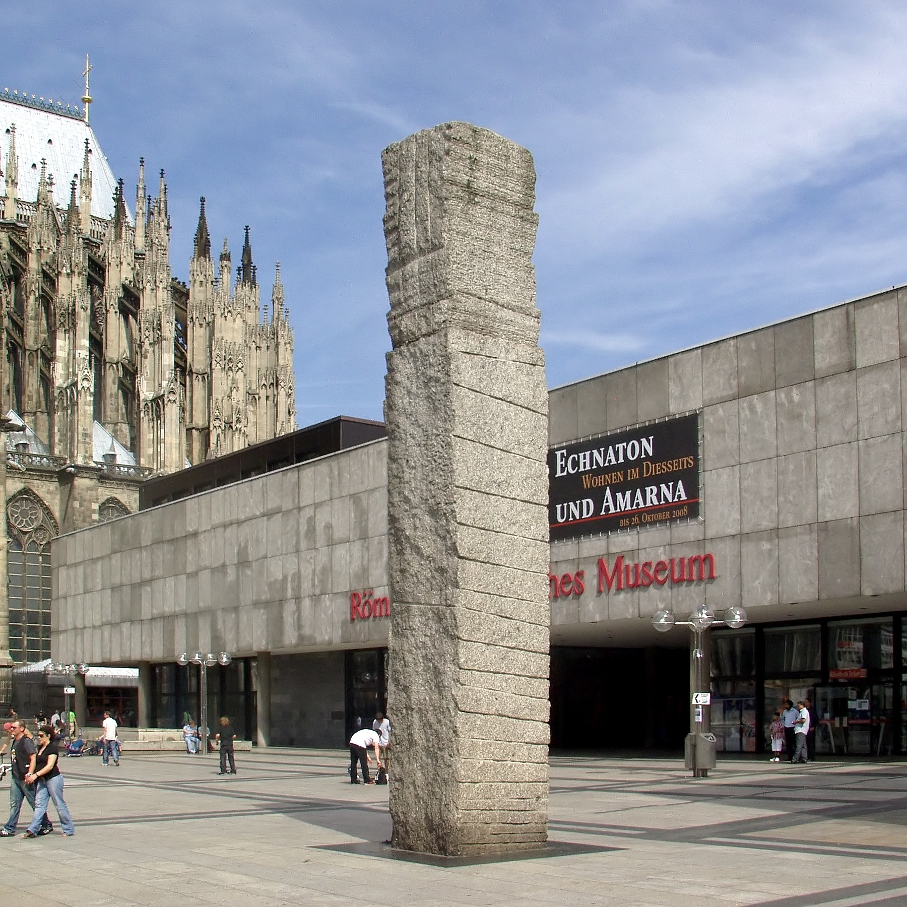 Im Hintergrund das Römisch-Germanische Museum